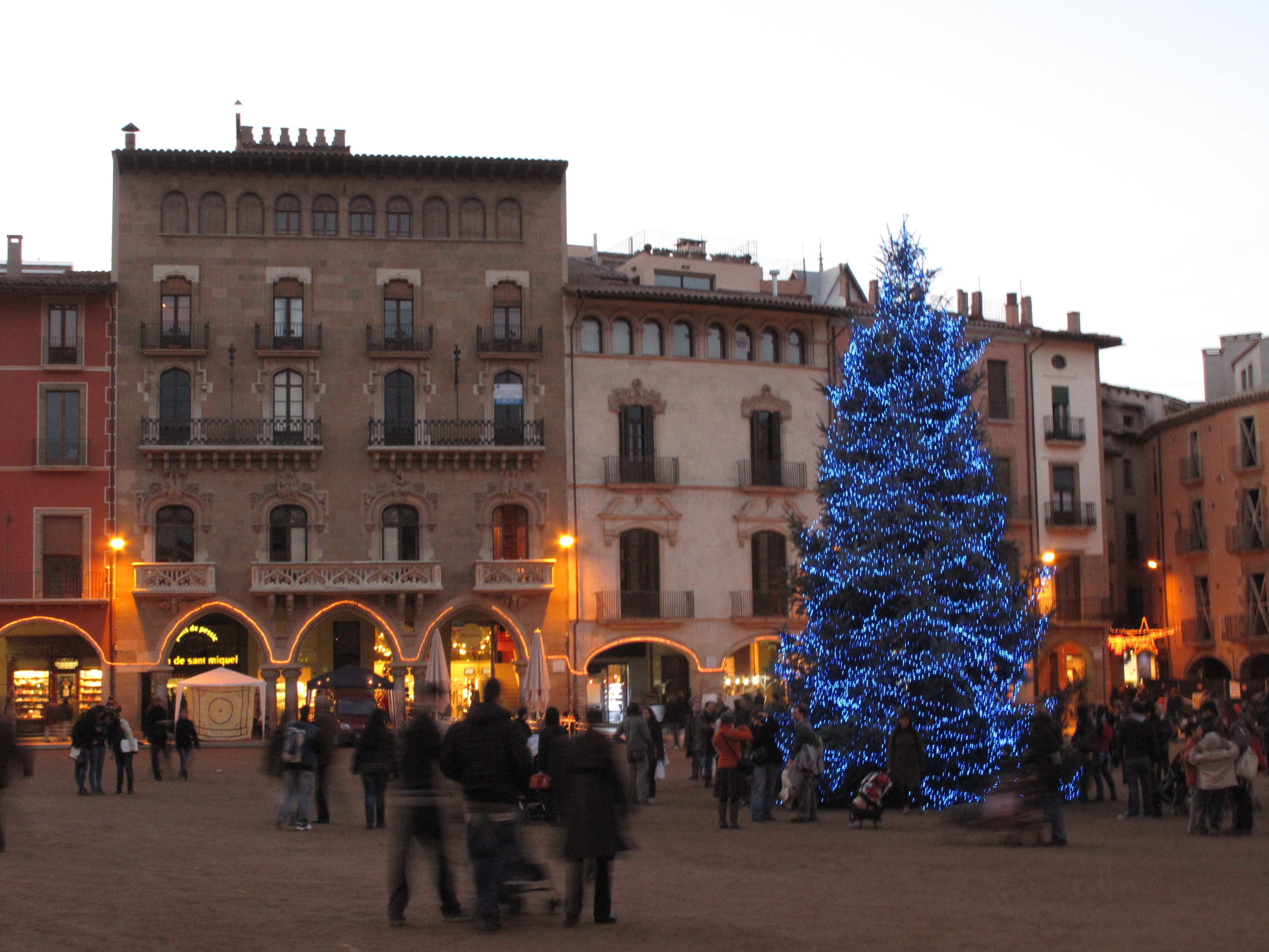 Nucli antic de Vic